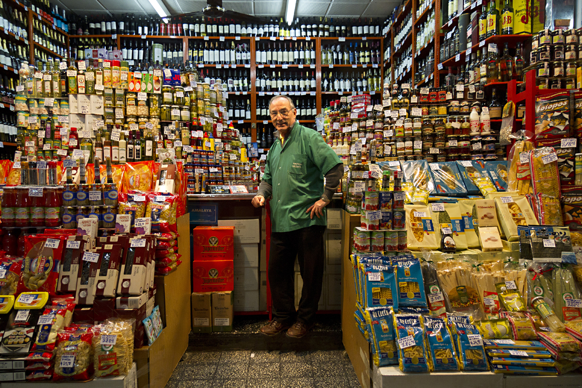 Foto: Estrella Herrera